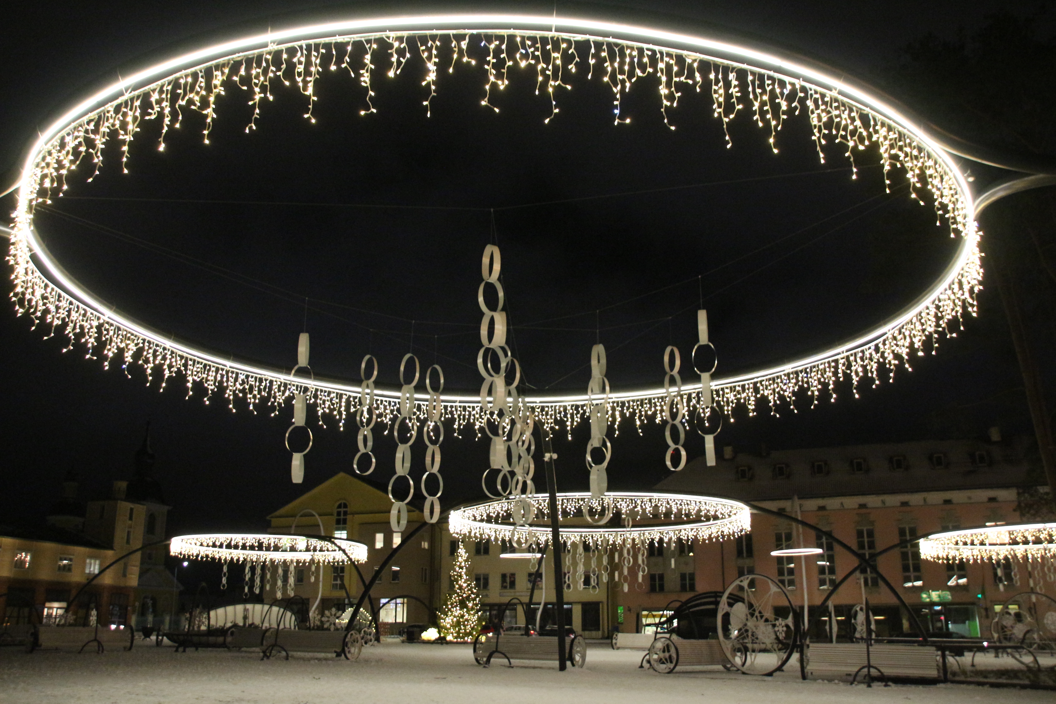 Võru keskväljak detsembris 2019